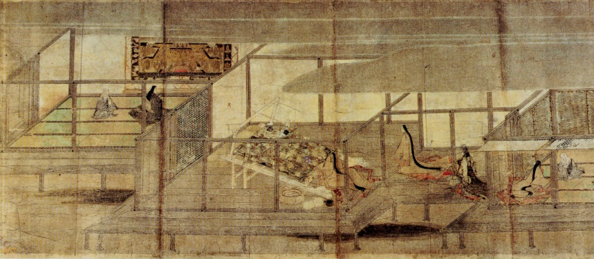 Tissage du Taima mandala par une religieuse qui est en réalité une manifestation du boddhisatva Kannon, envoyée par le bouddha Amida. Les pièces du temple montrent différentes étapes du récit (